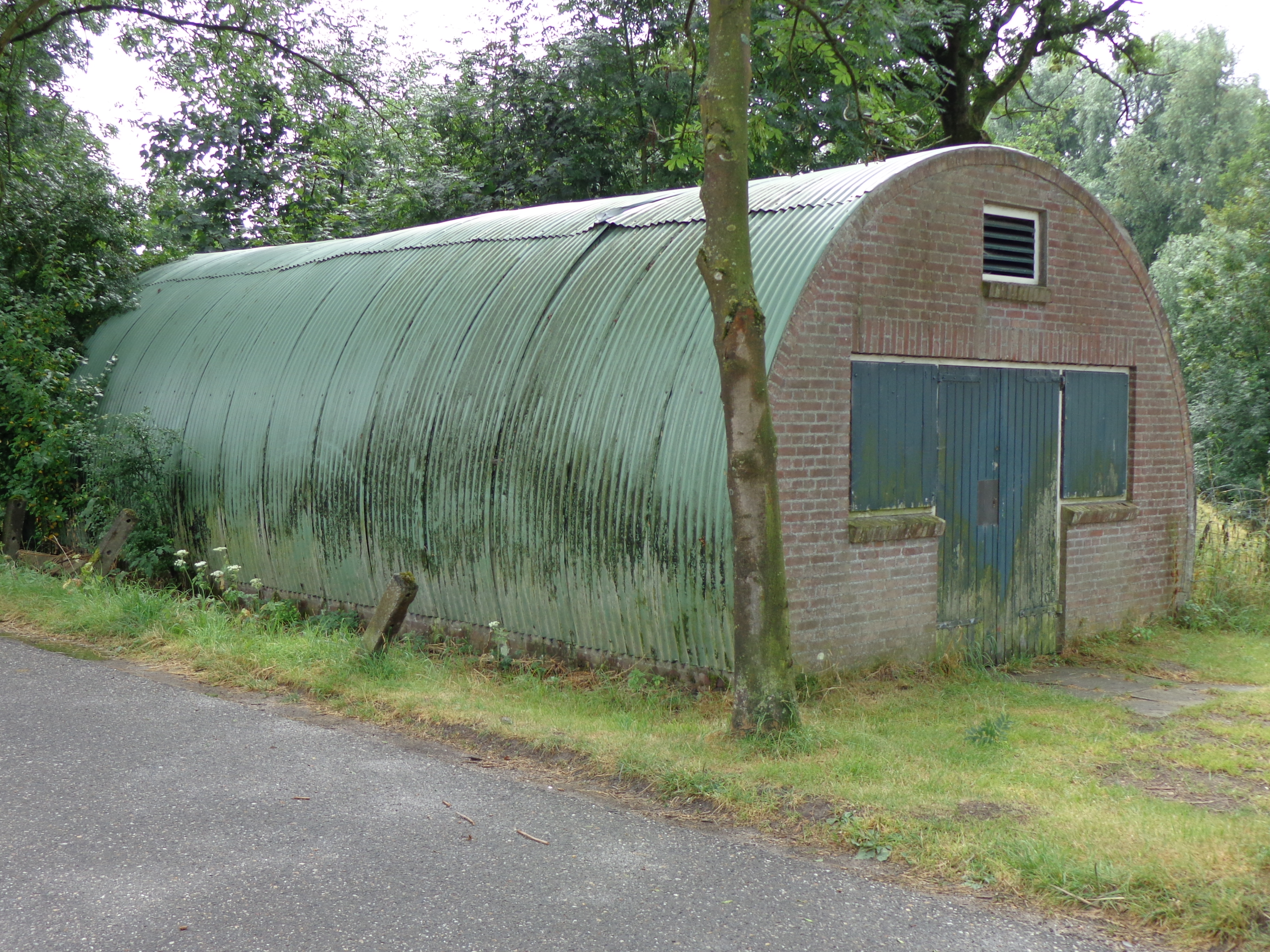 Wapenplaats bij Asperen